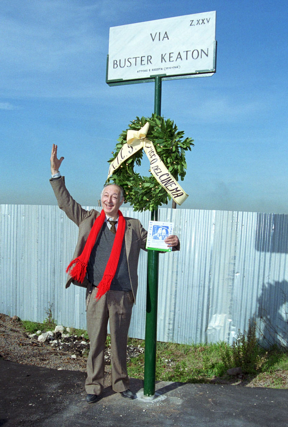 Josè Pantieri il 20/11/2000 all'inaugurazione di via Buster Keaton a Roma